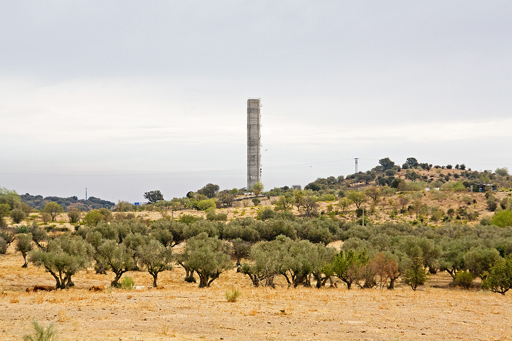 Chimenea de equilibrio en el transvase San Juan - Valmayor situado junto a Navas del Rey